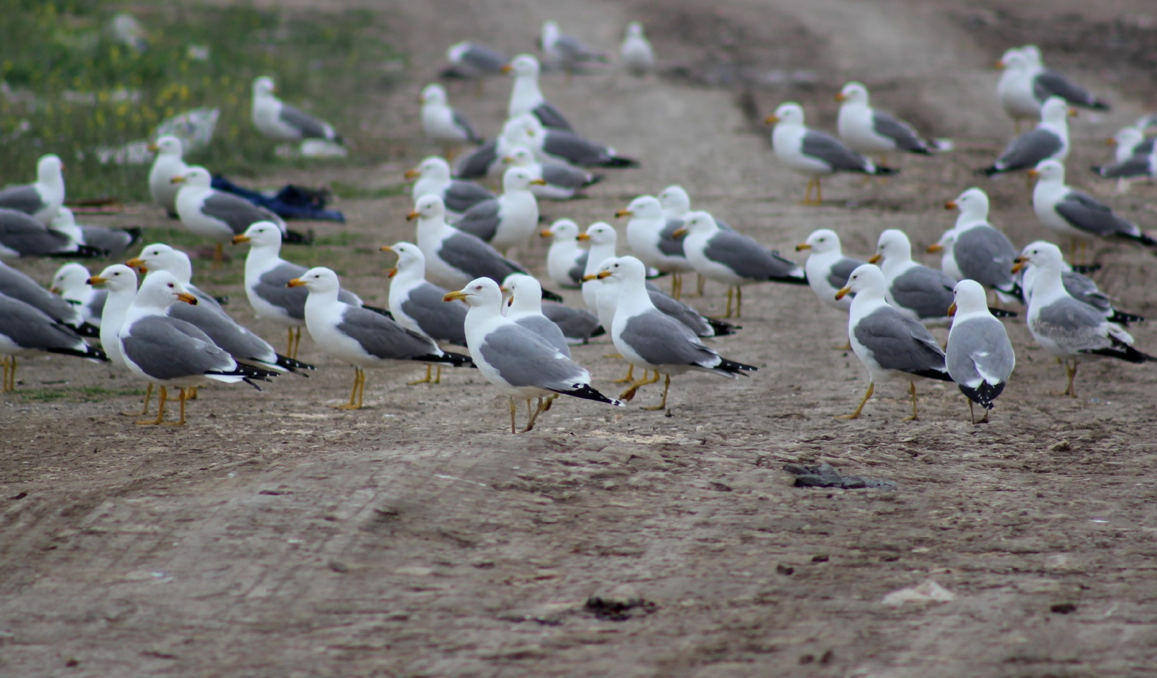 Gəncə şəhəri yaxınlığında iri bir koloniya